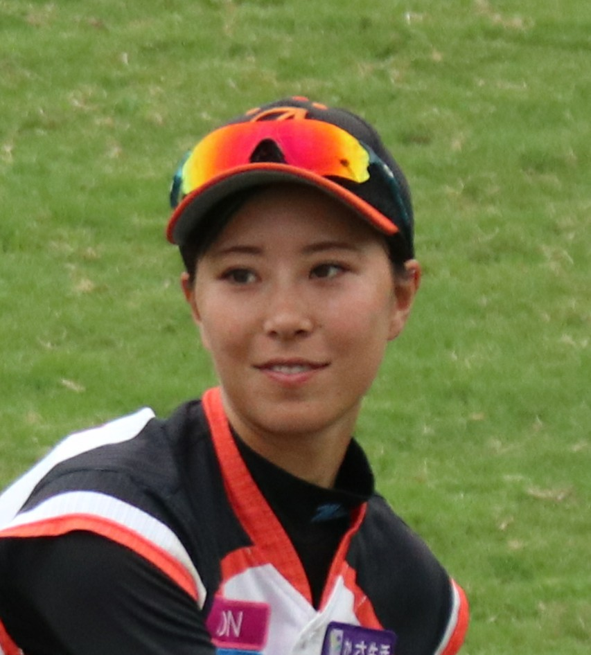 高塚南海女子プロ野球